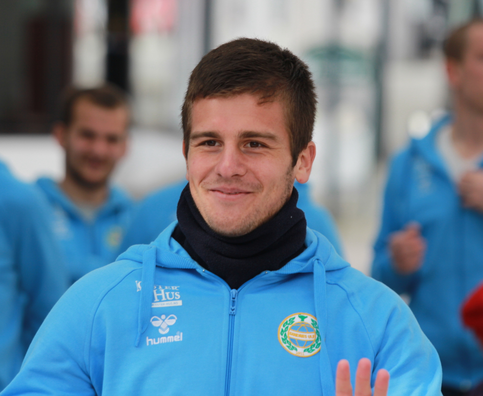 Diego Iván Rubio Kostner foran 2014 sesongen for Sandnes Ulf